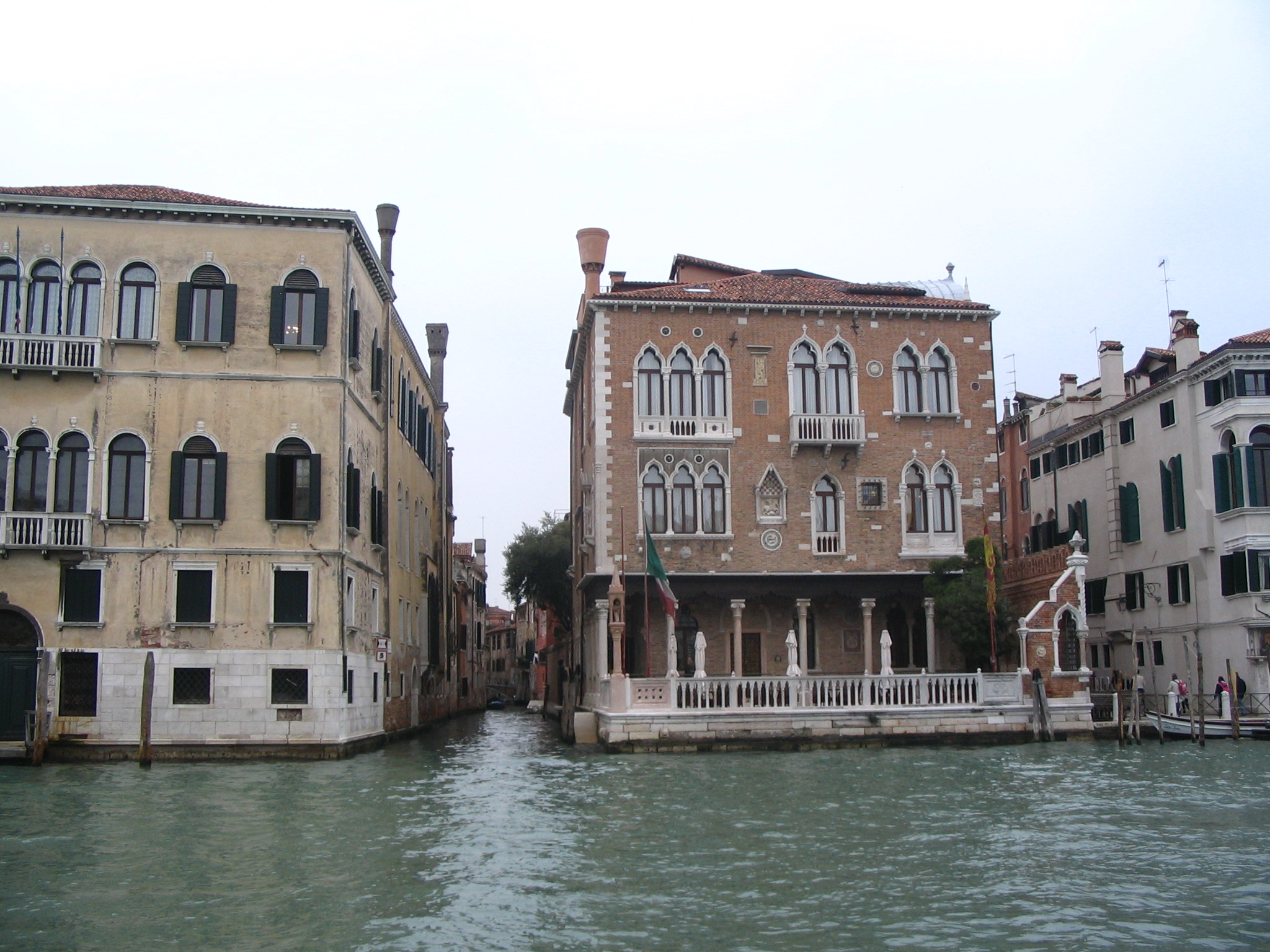 Palazzetto Stern - Venise - Italie